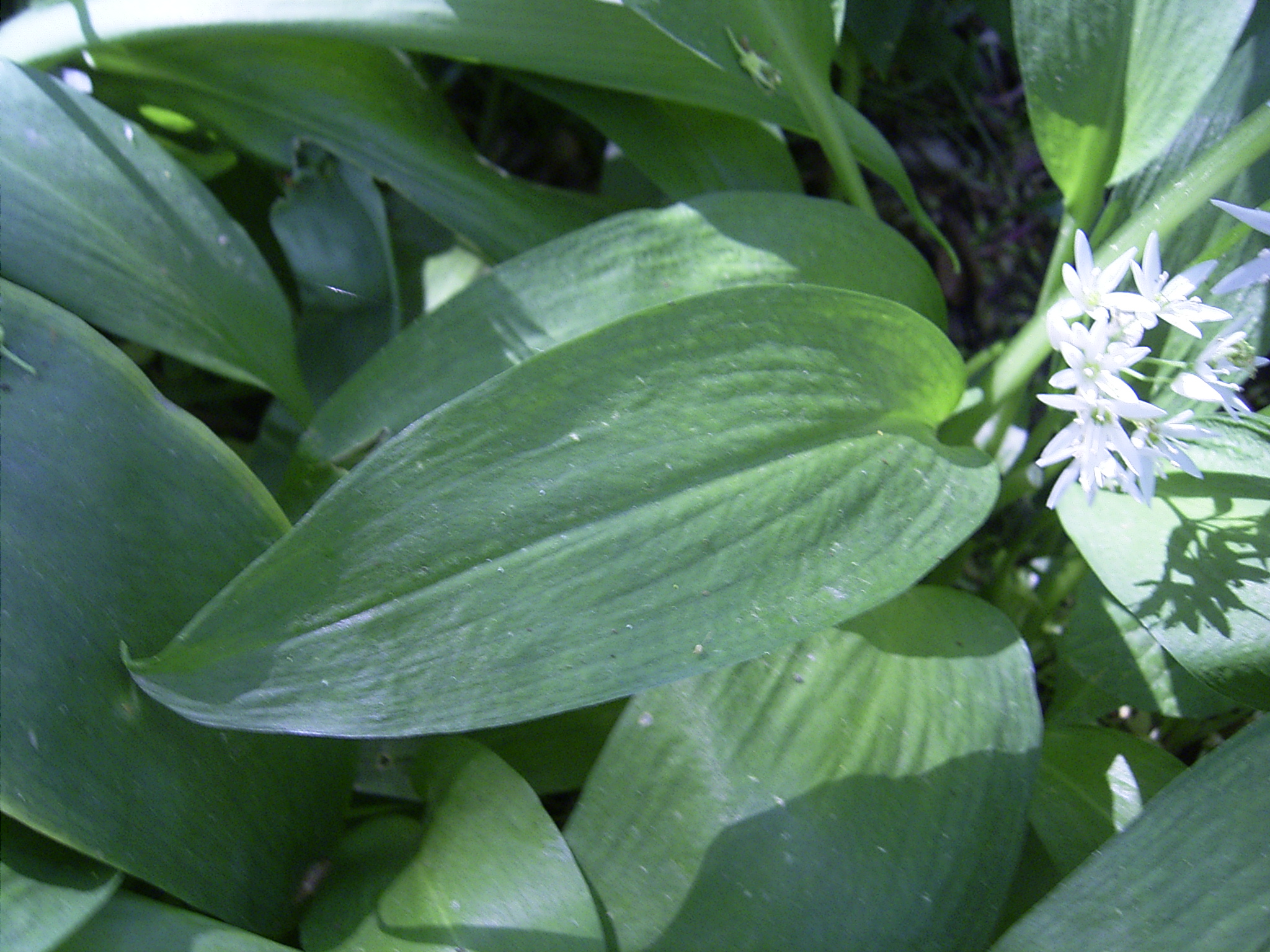 eigen foto, 30 april 2004